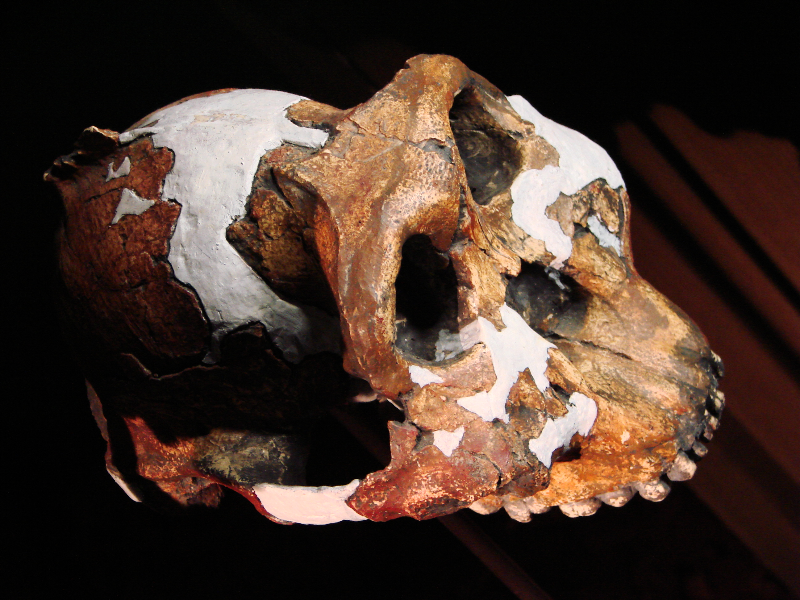 Muséum d'Anthropologie, campus universitaire d'Irchel, Université de Zurich (Suisse) : Paranthropus boisei, numéro identification OH 5 (Olduvai, Tanzanie)